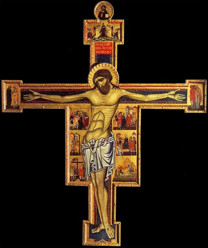 Crucifix. San Gimignano